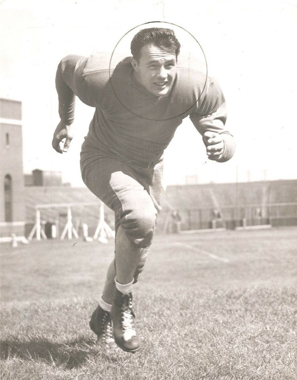 Verne Gagne playing football with the backcover en 1946 WITHOUT ANY COPYRIGHT INFRIGEMENT!!!!!!!!!!!!!!!!!!!!!!!!!!!!!!!!!!!!!!